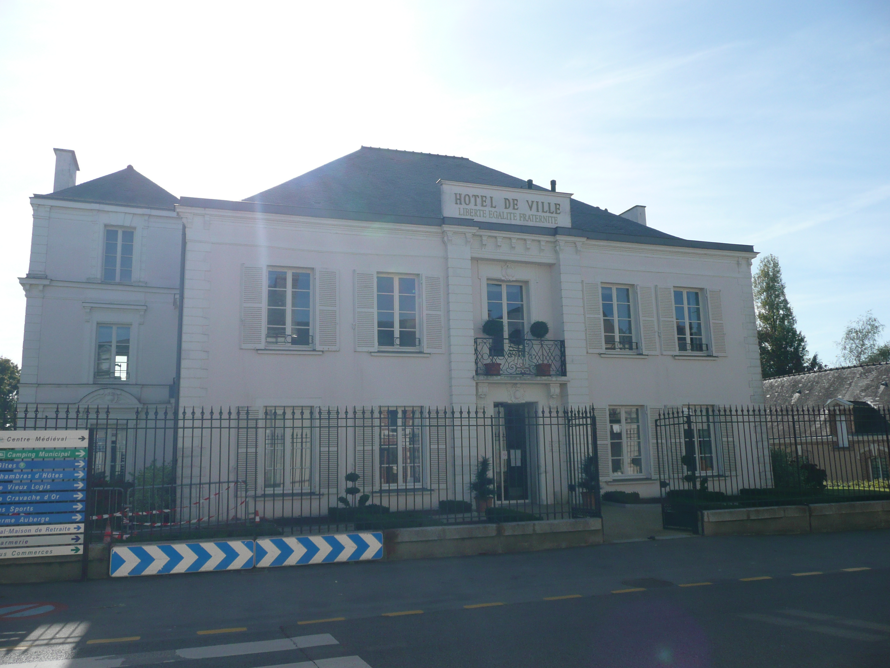 Mairie de Pouancé, localisée dans un ancien hôtel particulier du XIXe siècle, dans lequel Yves Robert passa une partie de son enfance.